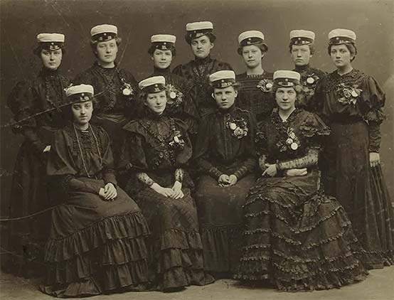 Swedish female students at their graduation from Tekla Åbergs högre läroverk för flickor in Malmö in Sweden